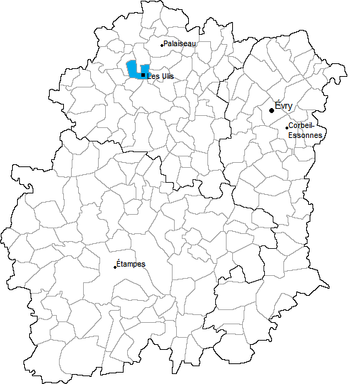 Carte du canton des Ulis en Essonne (91)